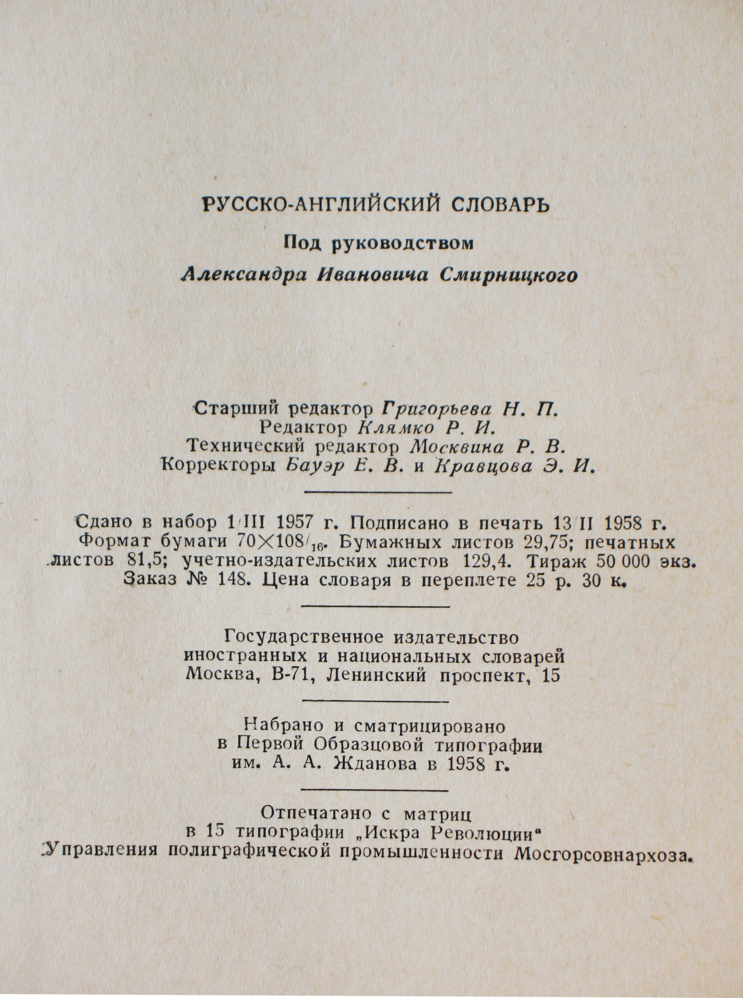 Russian-English Dictionary. Moscow, 1958. Русско-английский словарь под редакцией профессора А.И. Смирницкого. Москва, 1958, тираж 50000, цена 25-50, 952 стр., размер 265 на 185 мм. Выходные данные. Отпечатан в Мосгорсовнархозе.